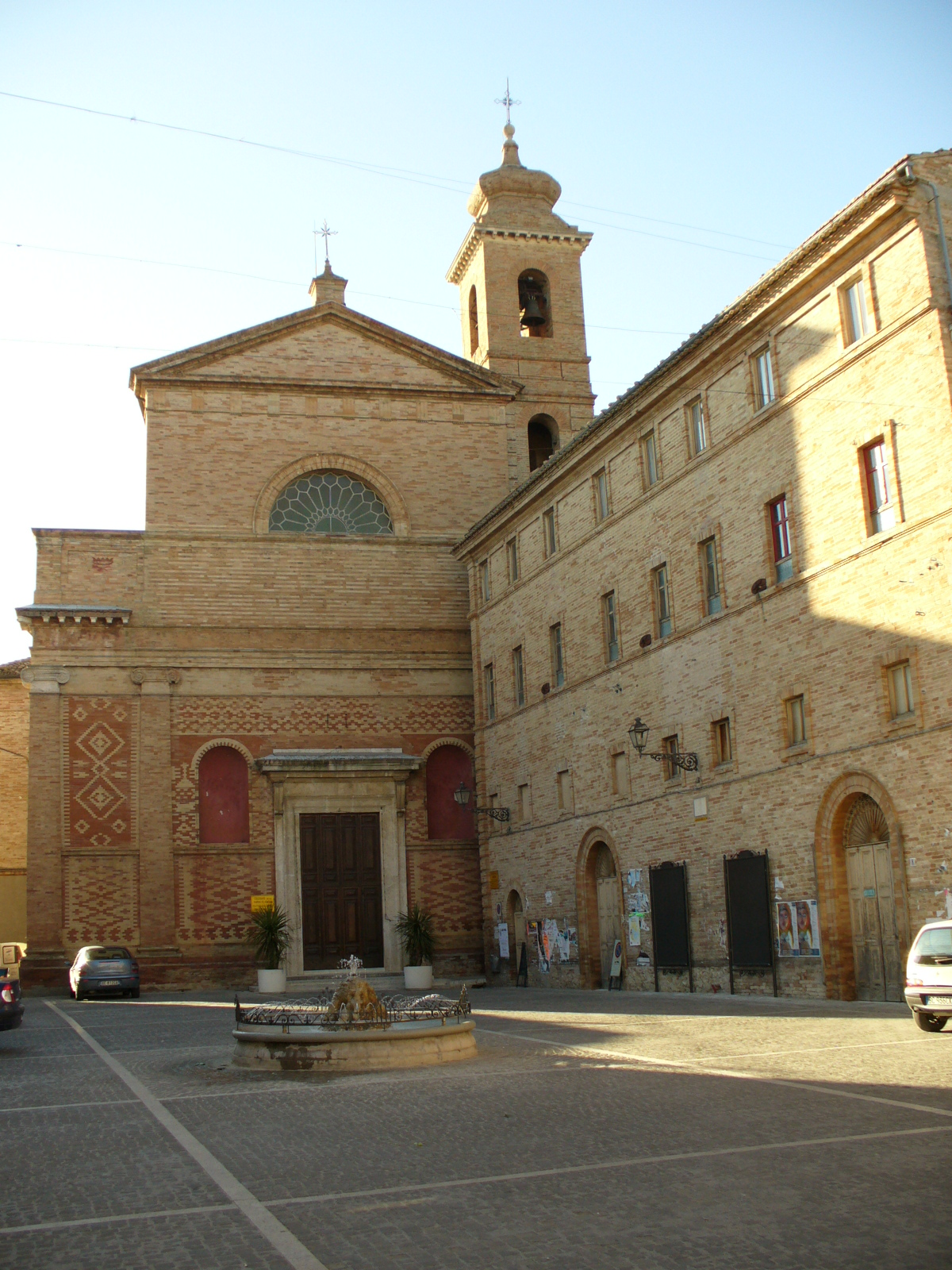 Collegiata di Montefiore dell'Aso, dedicata a Santa Lucia. sec.XIXMontefiore dell'Aso, la Collegiata